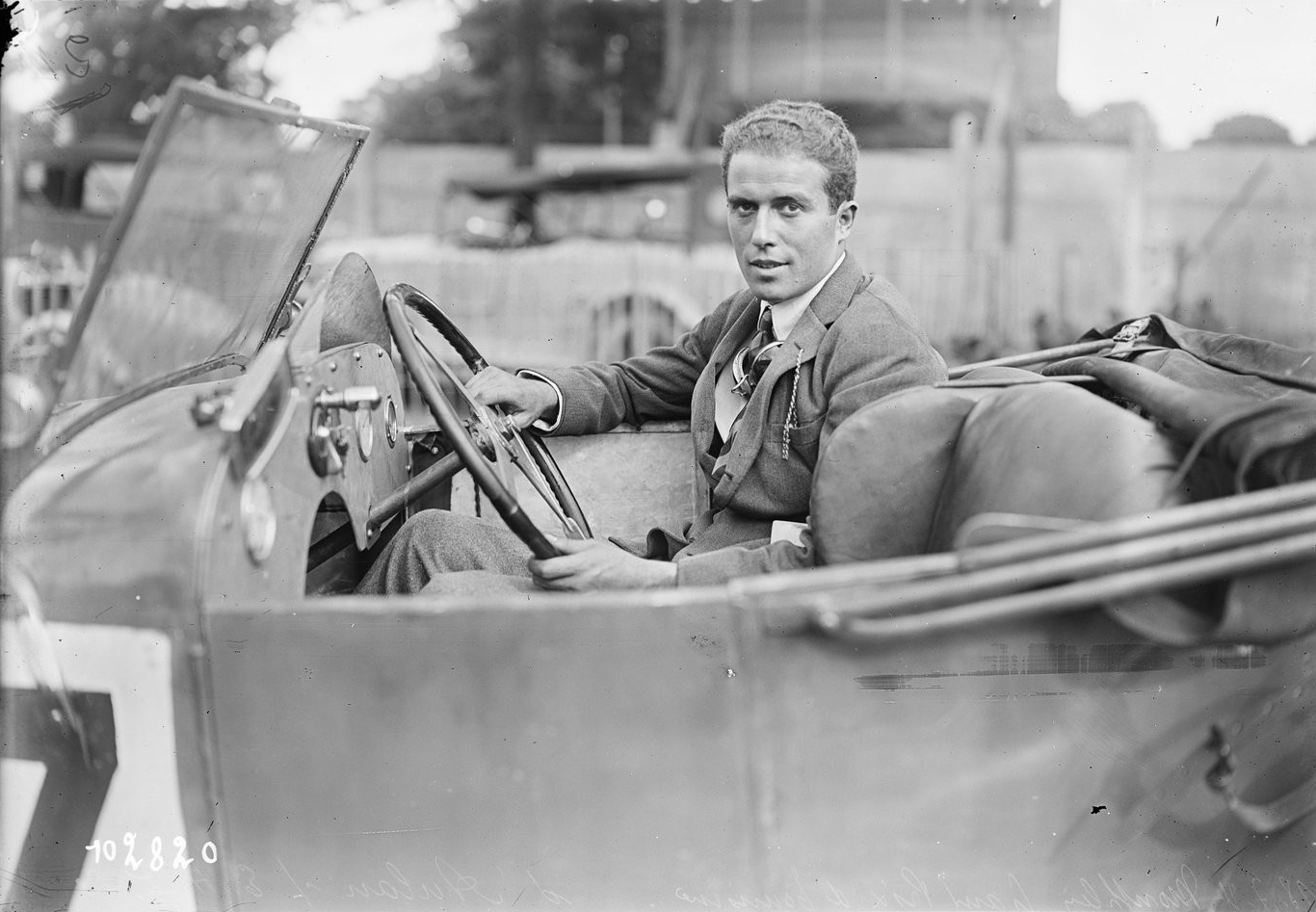 18-7-25, Montlhéry (i.e. autodrome de Linas-Montlhéry), Grand prix de (voitures de) tourisme, d'Aulan sur E.H.P. - (photographie de presse) - (Agence Rol)